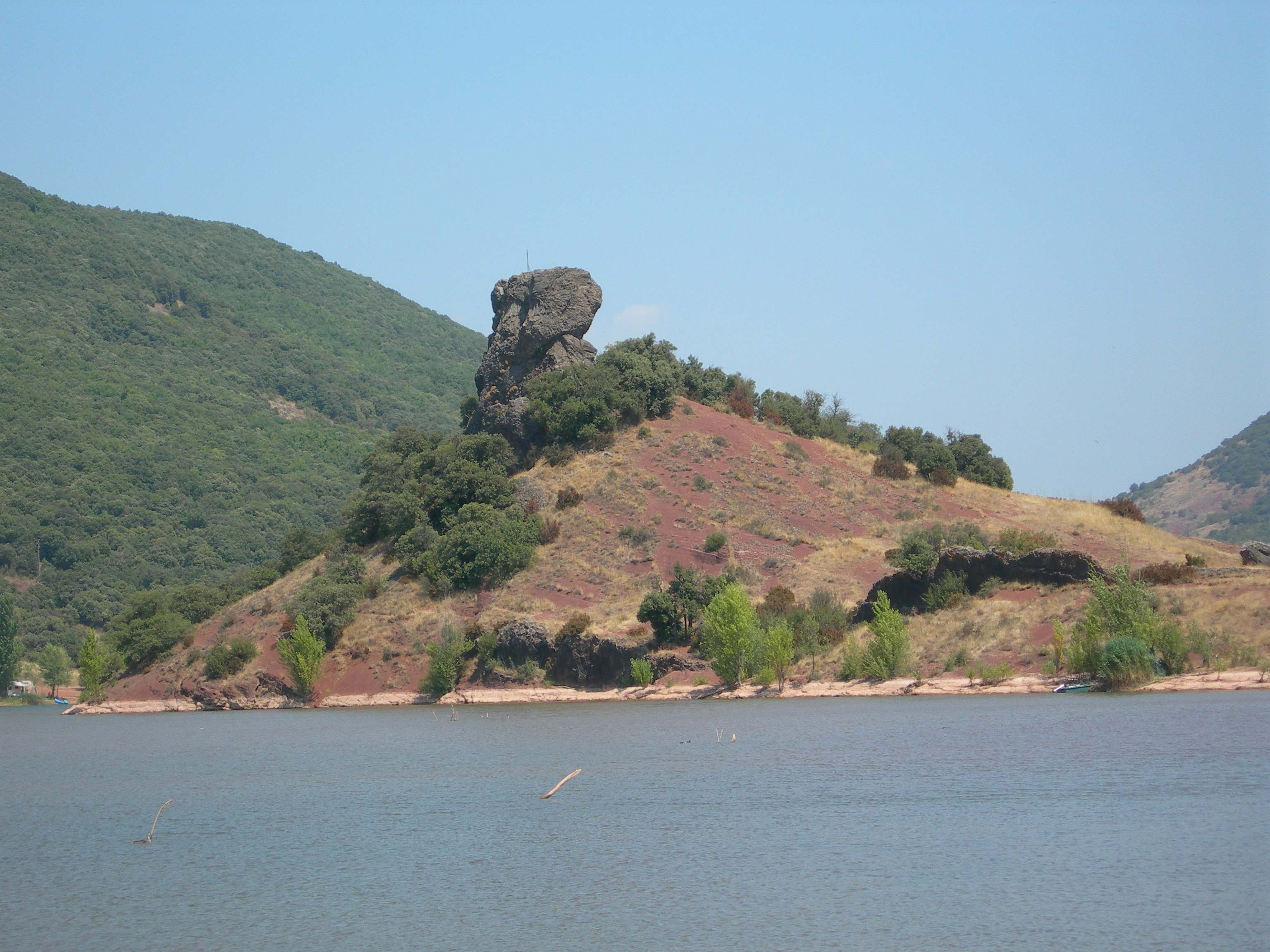 Lac du Salagou, piton rocheux